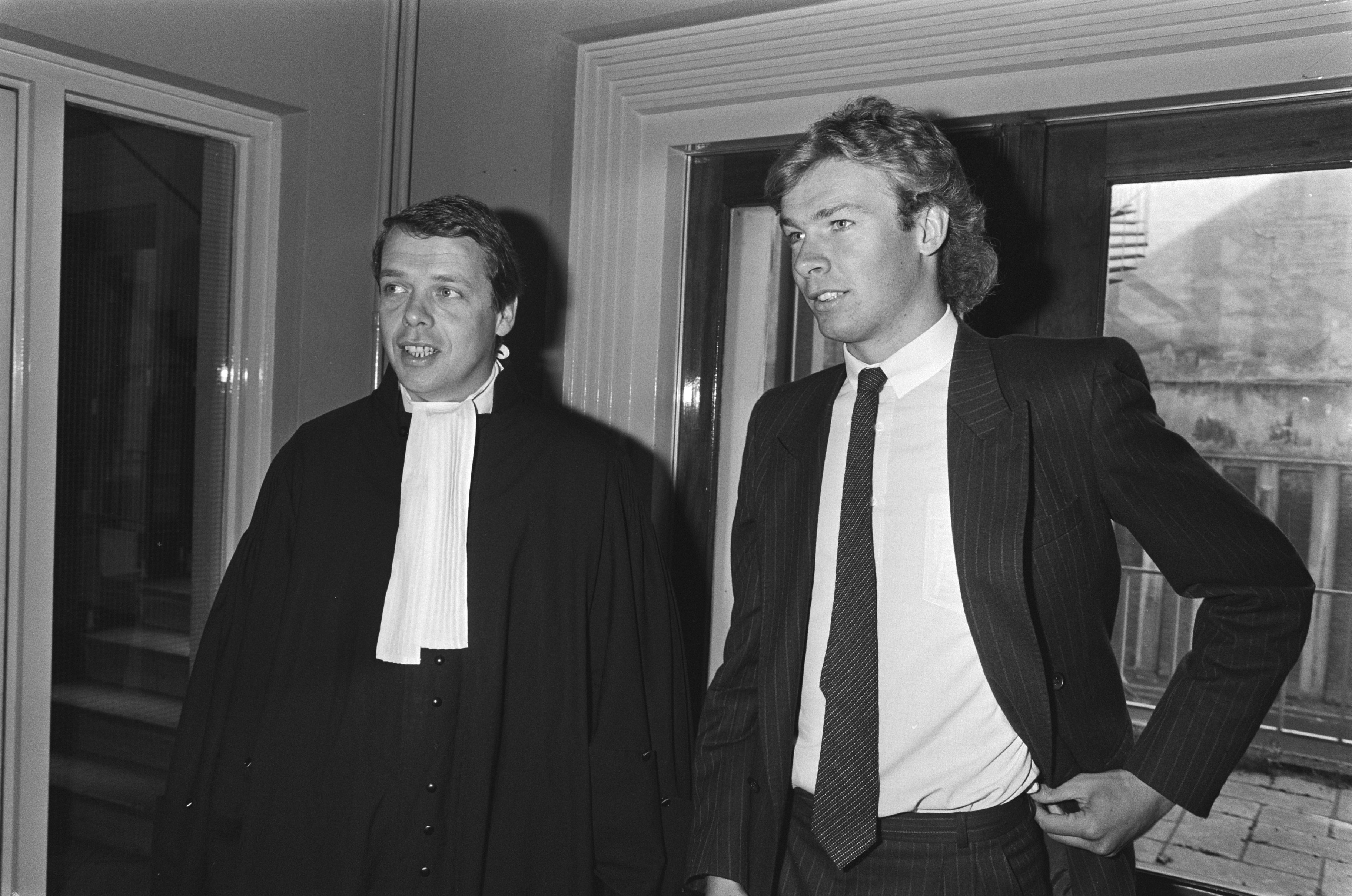 Collectie / Archief : Fotocollectie Anefo Reportage / Serie : [ onbekend ] Beschrijving : Kort geding voetballer Hans Kraay jr. , links advocaat Van Soest Datum : 29 augustus 1985 Trefwoorden : advocaten, rechtszittingen, voetballers Persoonsnaam : Kraay, Hans (jr.) Fotograaf : Croes, Rob C. / Anefo Auteursrechthebbende : Nationaal Archief Materiaalsoort : Negatief (zwart/wit) Nummer archiefinventaris : bekijk toegang 2.24.01.05 Bestanddeelnummer : 933-4066